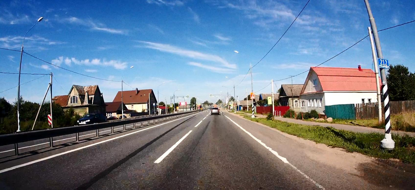 М-10 в районе села Марьино